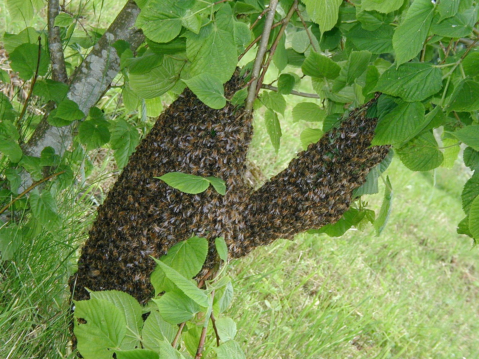 Bees swarming